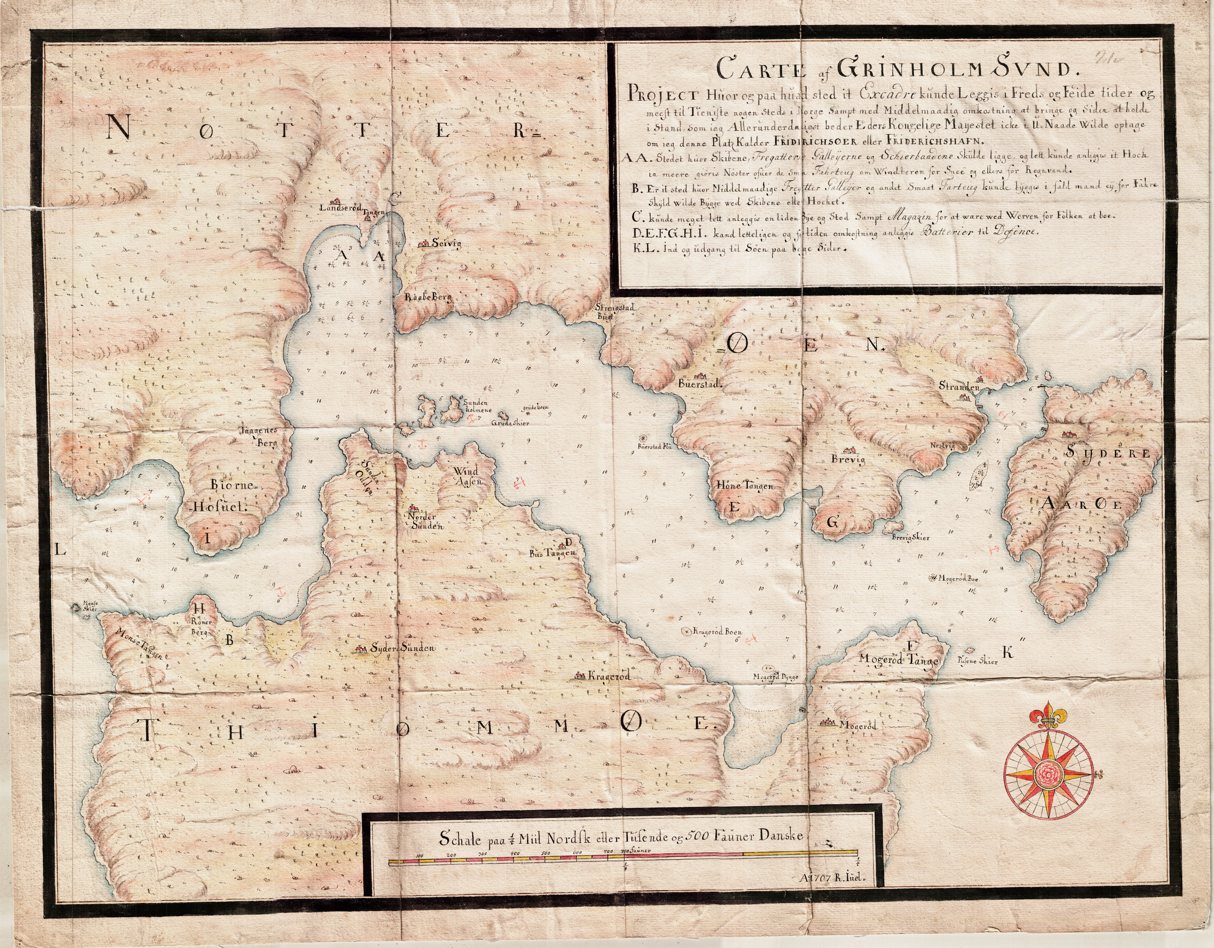 Sjøkart over havområdet mellom Nøtterøy og Tjøme fra 1707. Håndtegnet av R. Iùel i omtrentlig målestokk 1: 8500. Original kartstørrelse ca 56 x 44 cm. Et eksemplar befinner seg hos Statens kartverk Sjø i Stavanger. Tekst på kartet: Carte af Grindholm Sund Project Hvor og paa hvad sted it Excadre kunde Leggis i Freds og Feide tider og meest til Tieniste nogen Steds i Norge Sampt med Middelmaadig omkostning at bringe og siden at holde i stand, som ieg Allerunderdanigst beder Eder Kongelige Maijestet icke i U.Naade Wilde optage om ieg denne Platz Kalder FRIDIRICHSØER eller FRIDERICHSHAFN. AA. Steder hvor Skibene, Fregatter Galleÿerne og Schierbaadene skulde ligge, og lett kunde anleggis it Hoch ia meere giöris Nöster ofuer de sma Fahrteug om Windteren for Snee og ellers for Regnvand. B. Er it sted hvor Middelmaadige Fregatter Galleÿer og andet Smaat Farteug kunde bÿggis i fald man eÿ for Fahre Skÿld wilde Bygge wed Skibene eller Hochet. C.kunde meget lett anleggis en liden Bÿe og Sted Sampt Magasin for at wære wed Werven for Folken at boe. D.E.F.G.H.I. Kand letteligen og for liden omkostning anleggis Batterier til Defence. K.L. Ind og udgang til Søen paa bege Sider.